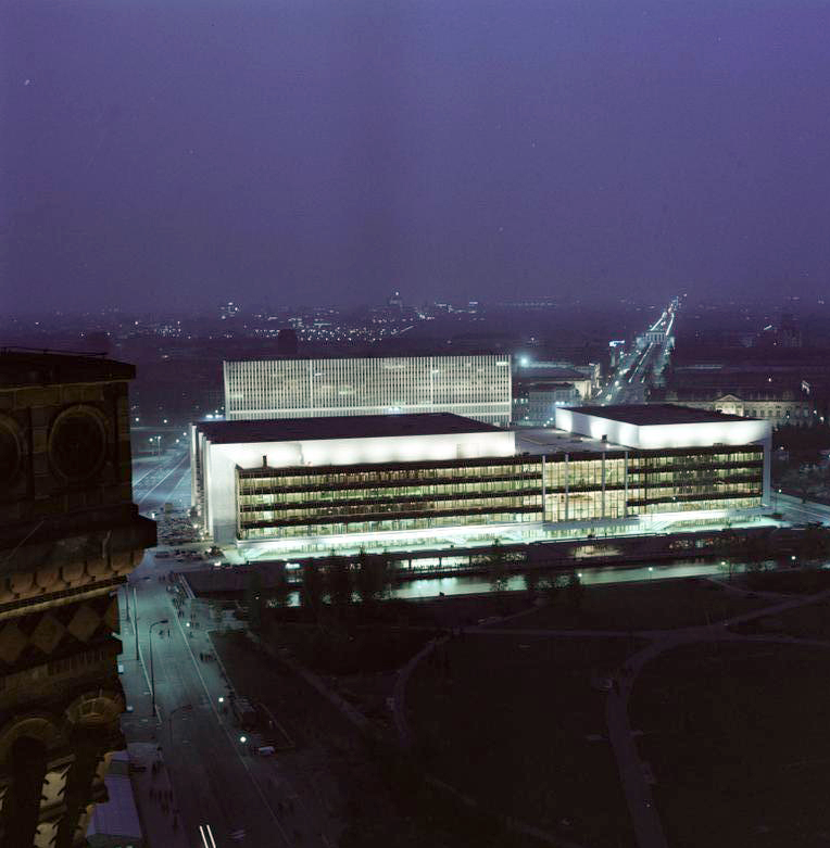 ADN-ZB / Kohls / 21.8.1976 / Berlin - Hauptstadt der DDR / Der Palast der Republik am Abend.